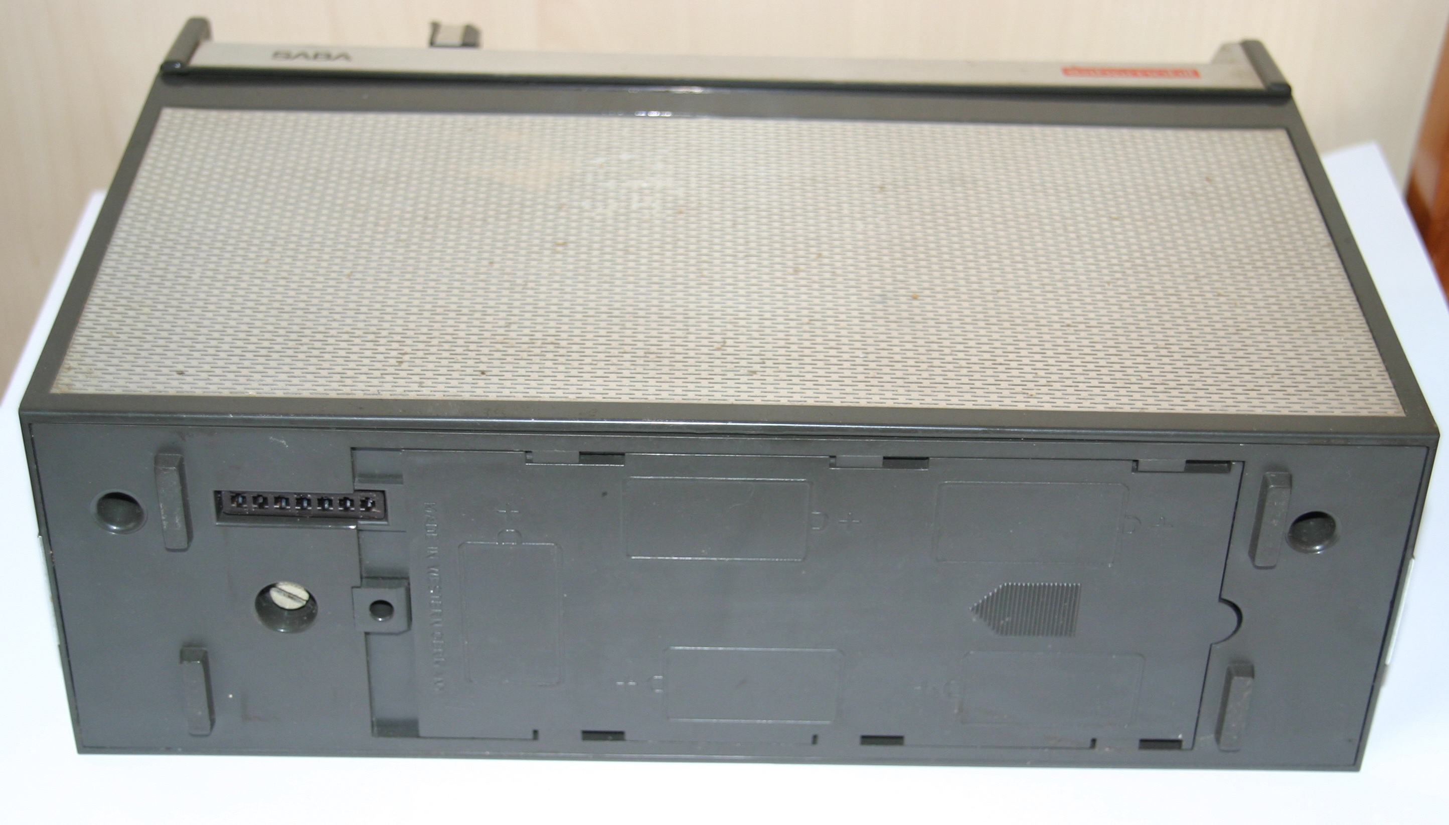 Unterseite eines Sabamobil. In das Batteriefach passen 5 Monozellen (7,5V). Da das System der Überlieferung nach als Diktiersystem verwendet worden ist, könnte die Buchse links oben für einen Fußschalter verwendet worden sein.